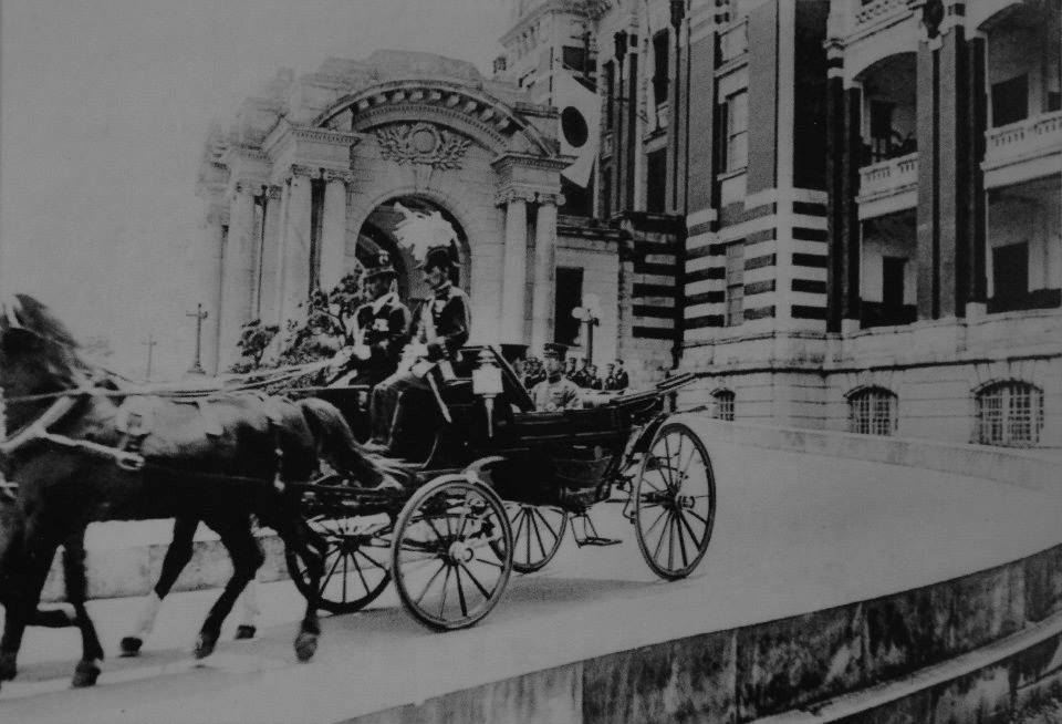 總督府前的昭和天皇，1923年